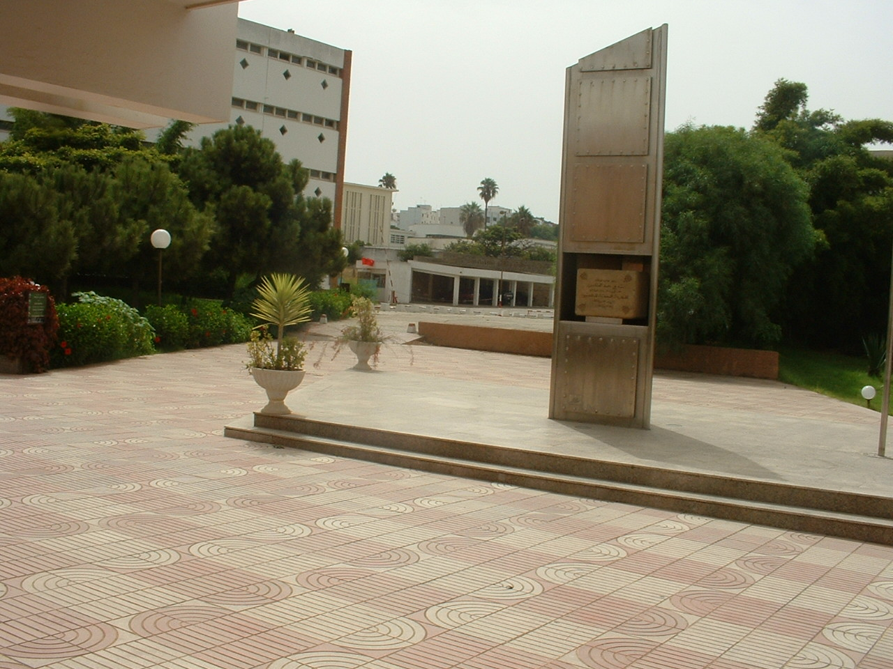 L'école Mohammadia d'ingénieurs à Rabat au Maroc en août 2004.